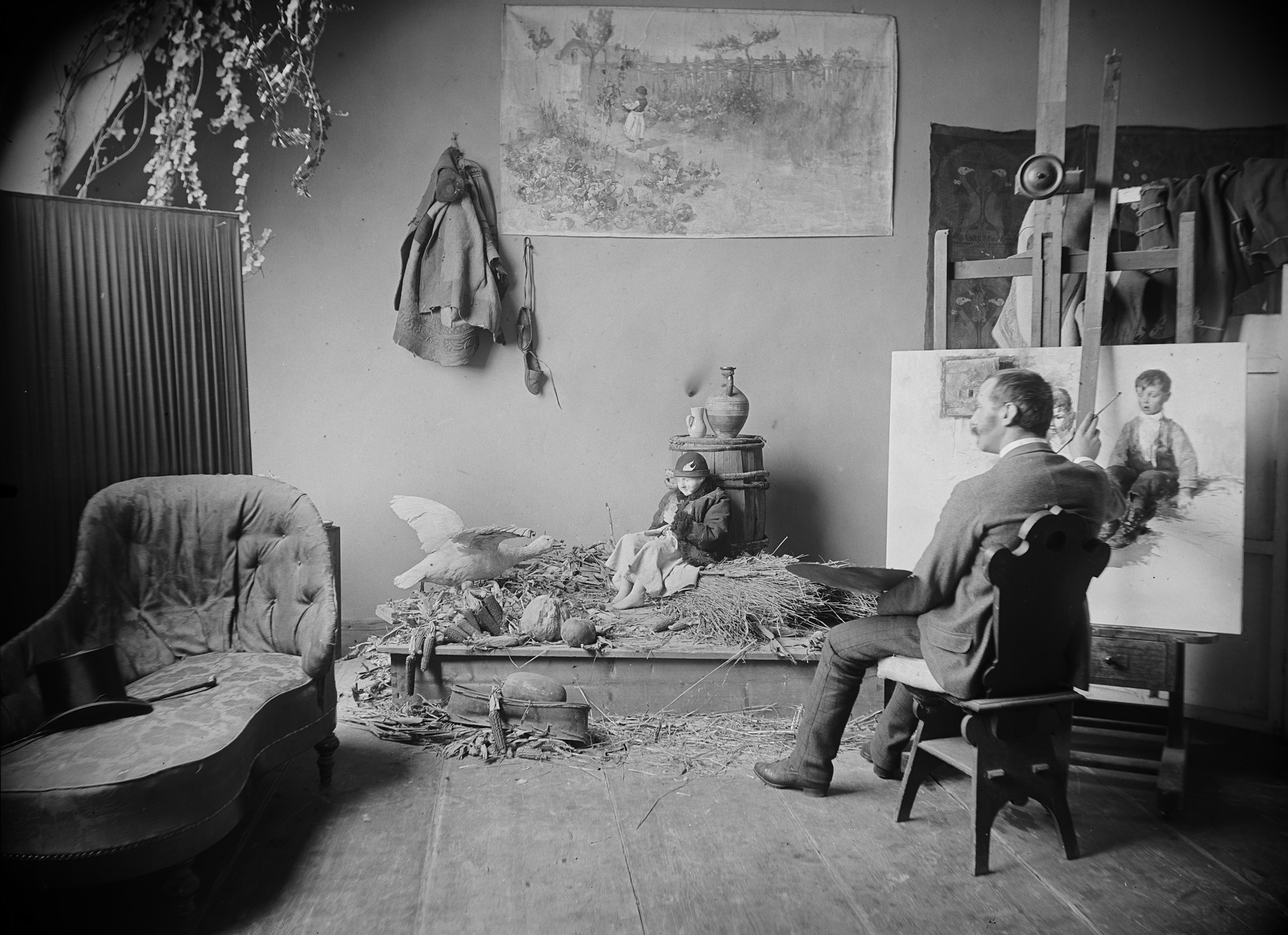 Géza Peske, Hungarian painter in his Studio